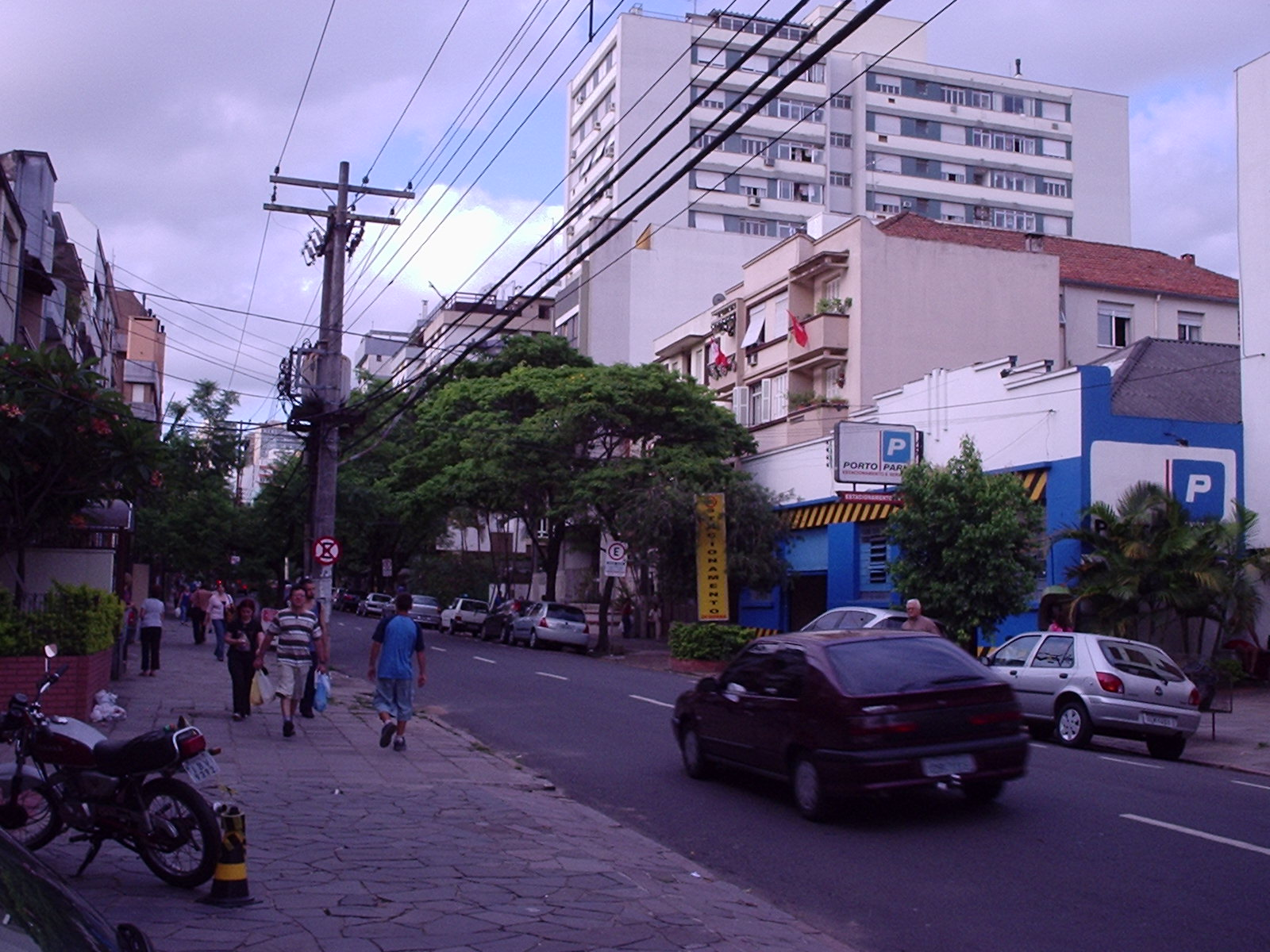 Aspecto do bairro Bom Fim, em Porto Alegre. Rua Felipe Camarão.